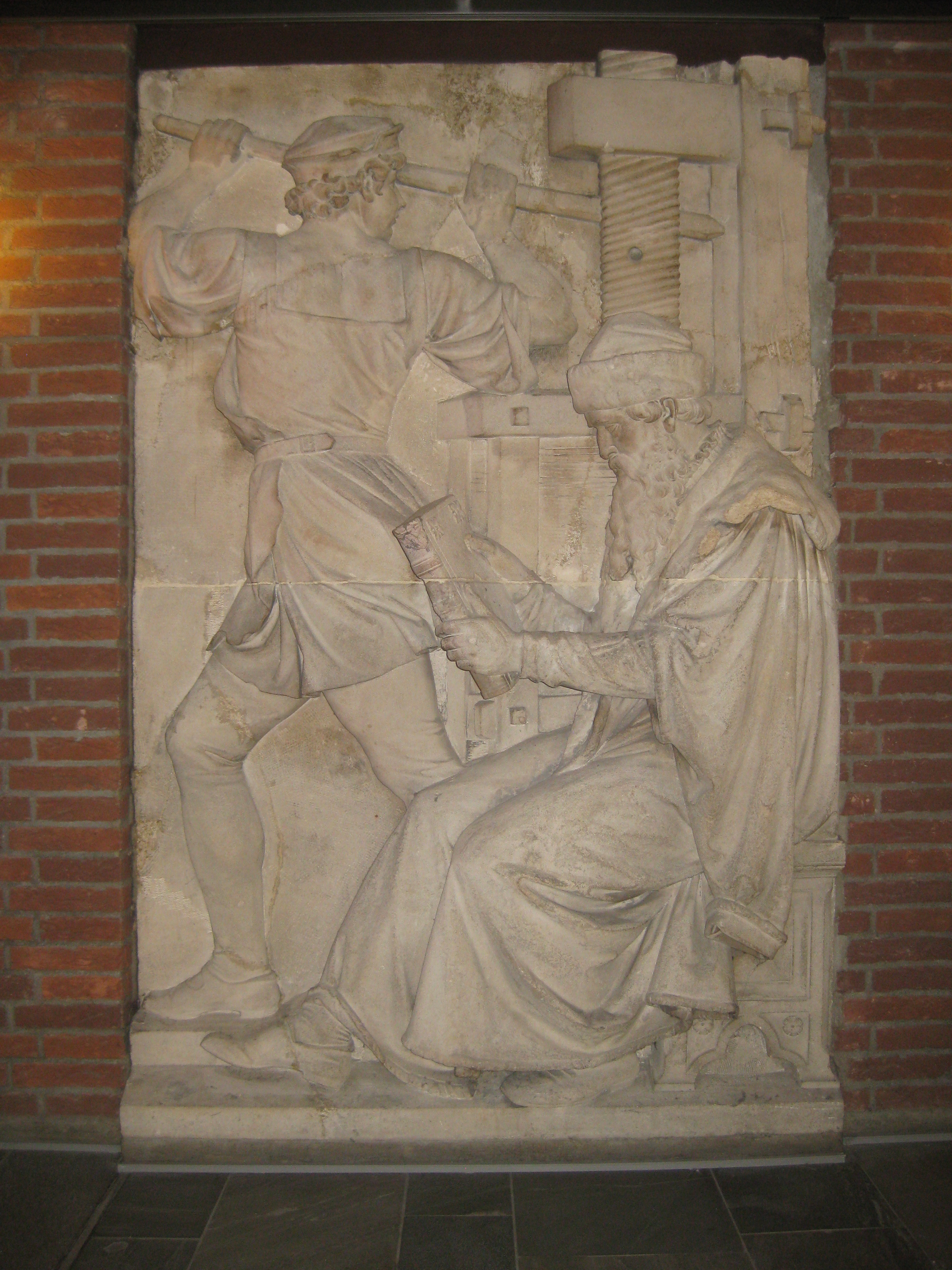 „Gutenberg und die Druckerpresse“, Relief von Adolf von Donndorf, 1885–1888, von der 1944 zerstörten Alten Landesbibliothek in Stuttgart, heute in der Württembergischen Landesbibliothek Stuttgart.